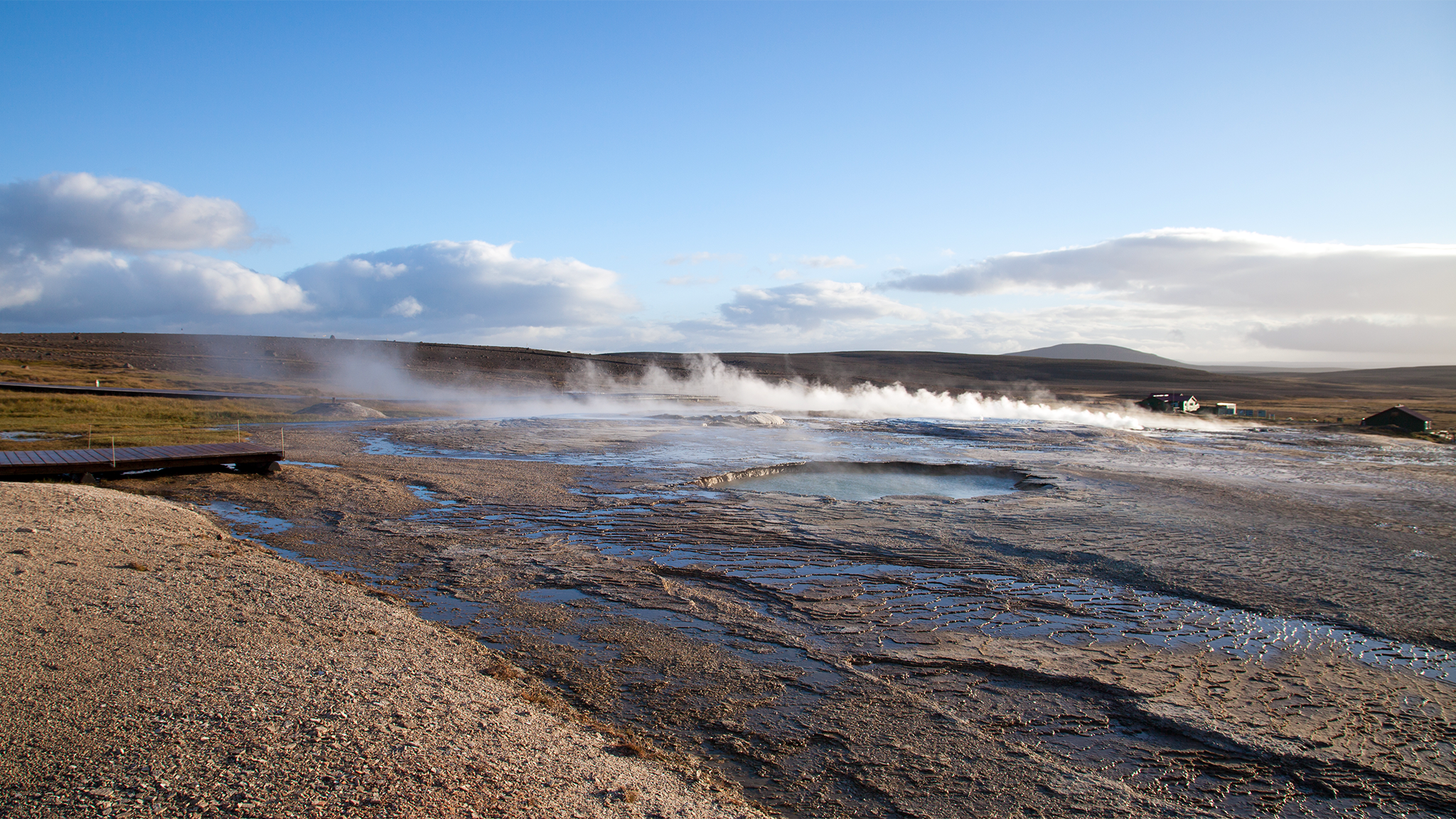 Hveravelir